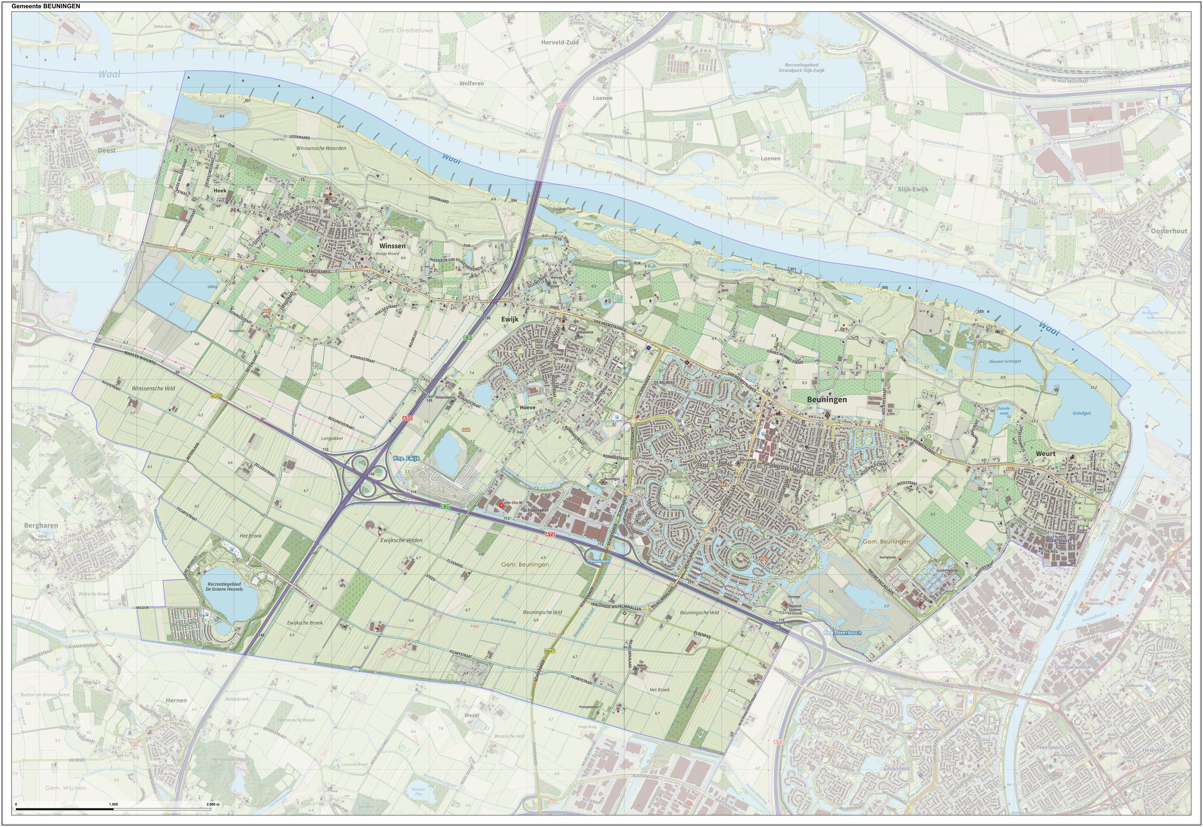 Topografische gemeentekaart. Resolutie: 400 pixels/km. Kaartbeeld samengesteld uit de open geodata van de Top10NL en Top25namen (Kadaster), Creative Commons-BY licentie. Gebouwvlakken uit open geodata BAG extract. Wegen uit de OpenStreetMap, OpenStreetMap community. Reliëfschaduw uit de Actuele Hoogtekaart AHN2. Samenstelling en kleurenschema: Jan-Willem van Aalst, met QGIS. Zie ook de Legenda.